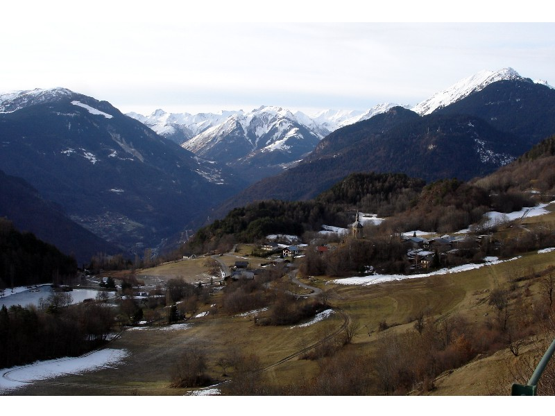 Le village de Hautecour